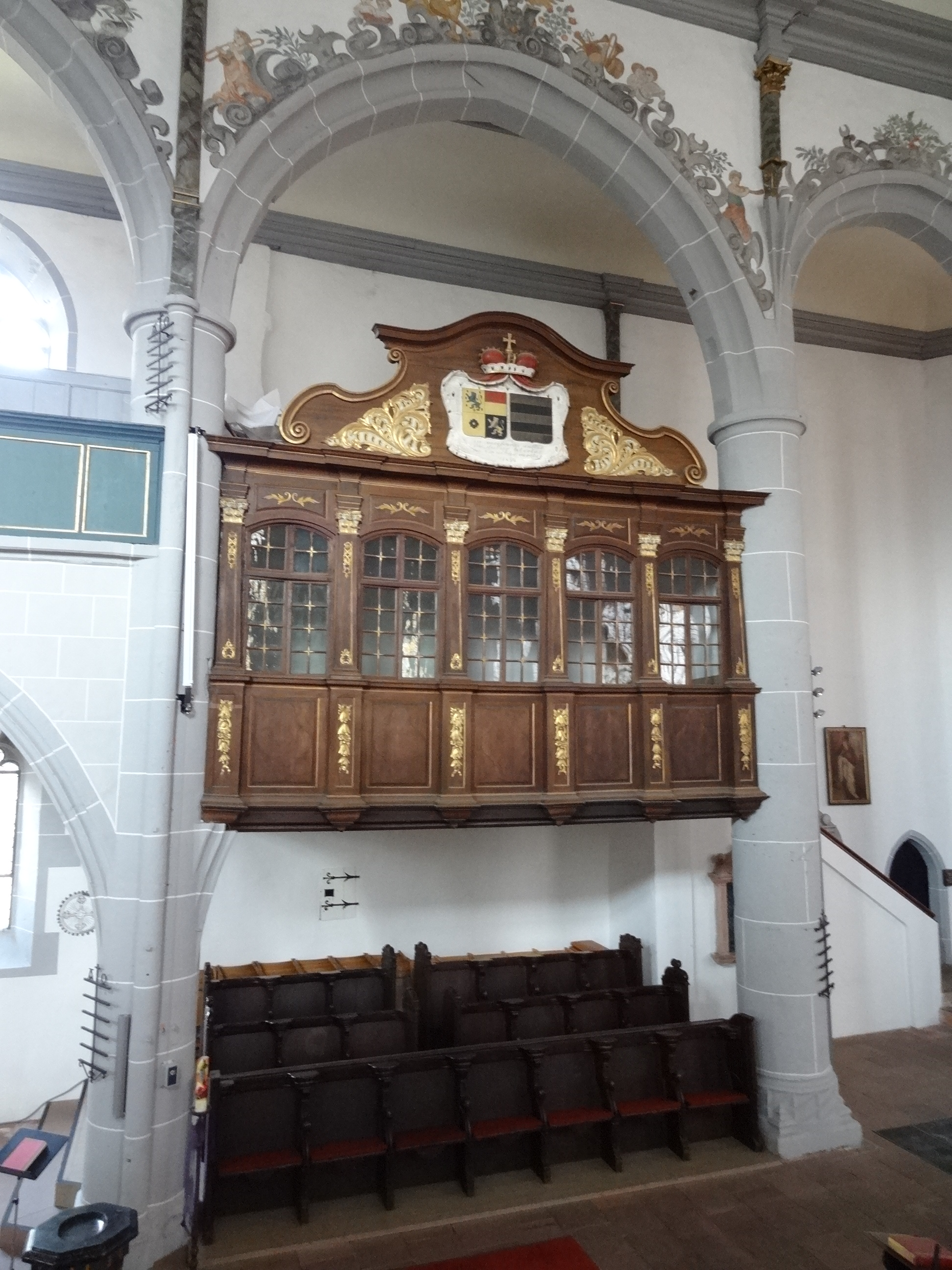 Marienstiftskirche Lich